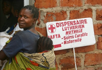 Zusammenarbeit mit kirchlichen Partnern.